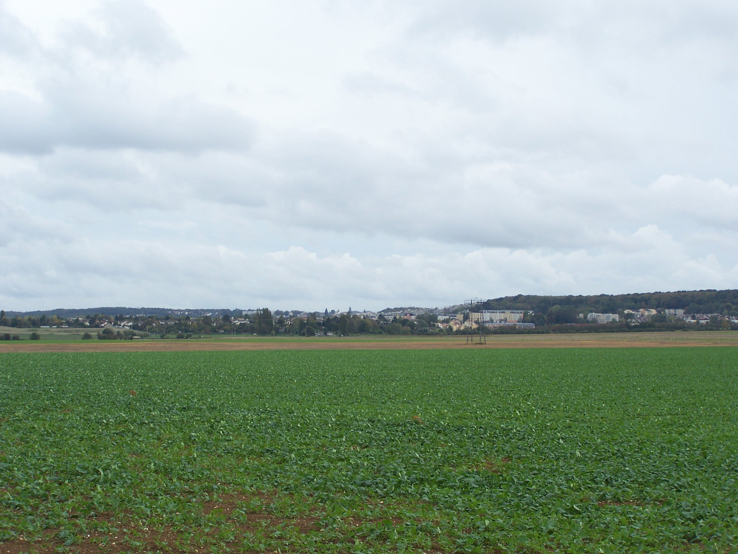 Vue de Fontenay-le-Fleury (Yvelines, France)